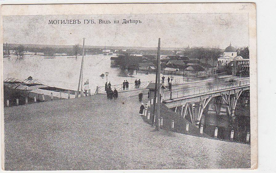 Беларуская (тарашкевіца): Магілёў (Mahiloŭ), панарама Лупалава (Łupałava) і Траечча (Traječča)